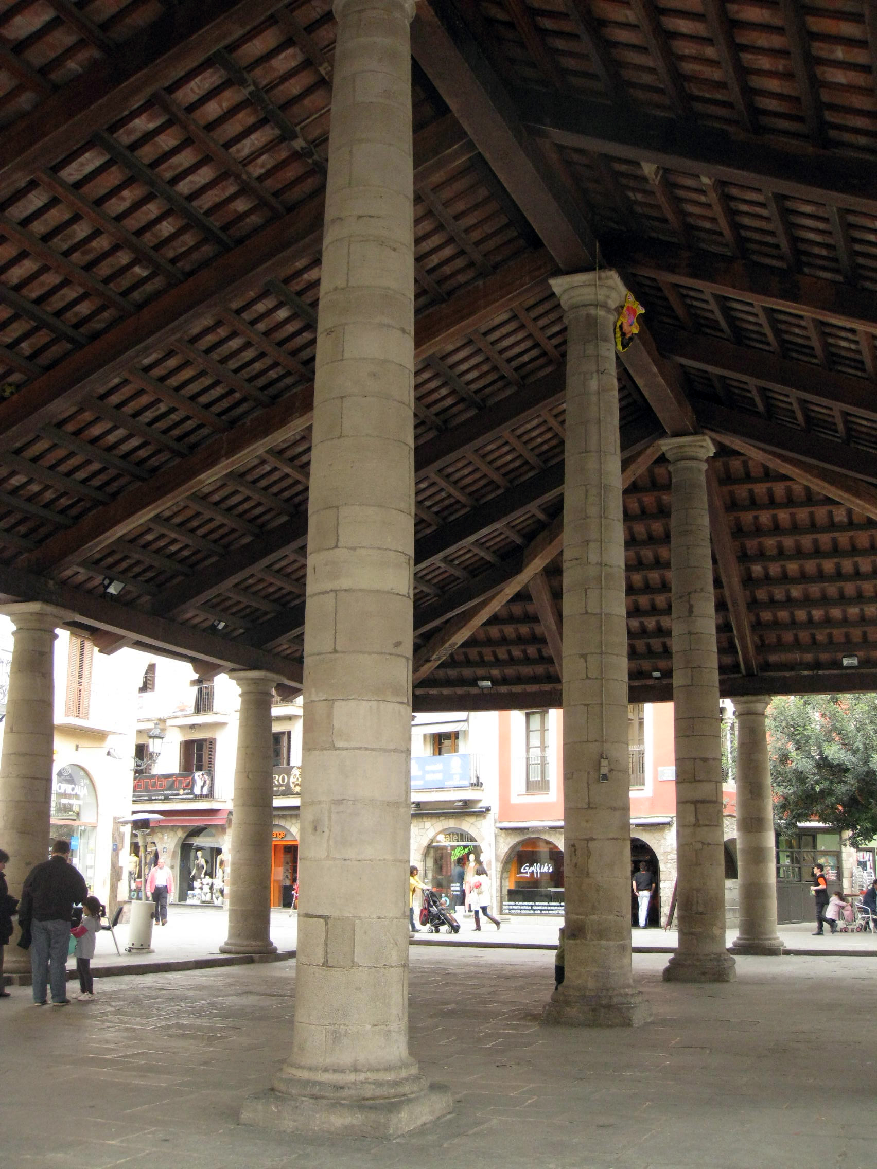 Porxada (Granollers) Object location41° 36′ 29.27″ N, 2° 17′ 15.72″ E